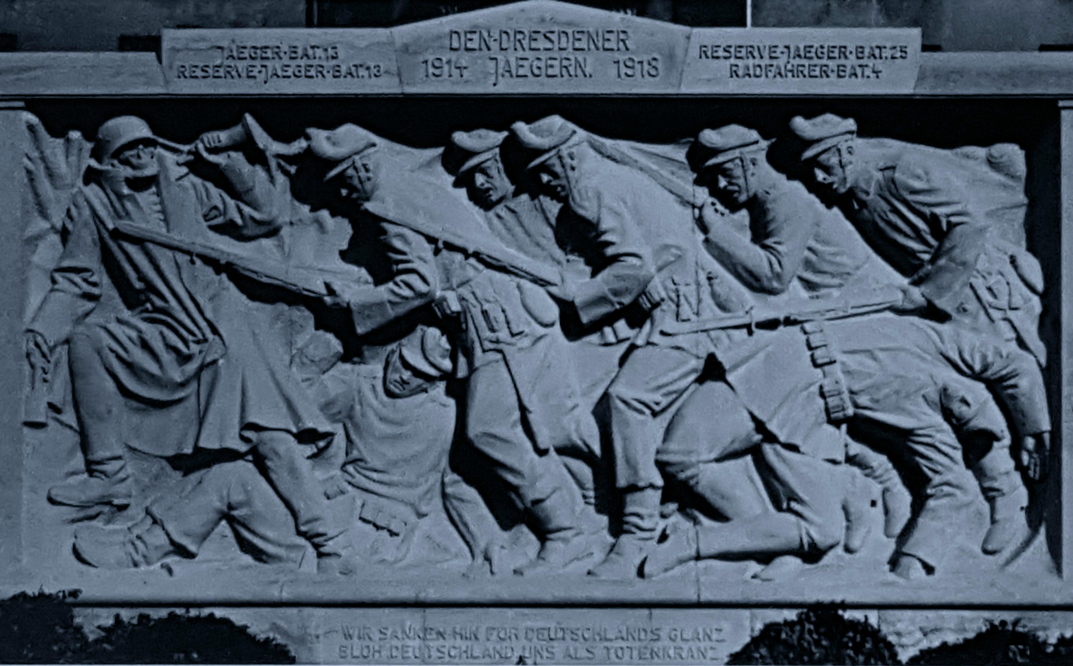 Ansichtskarte: Dresden, Das Jägerdenkmal in Dresden war Ehren- und Mahnmal für die Opfer und Gefallenen Dresdner Jäger im 1. Weltkrieg.